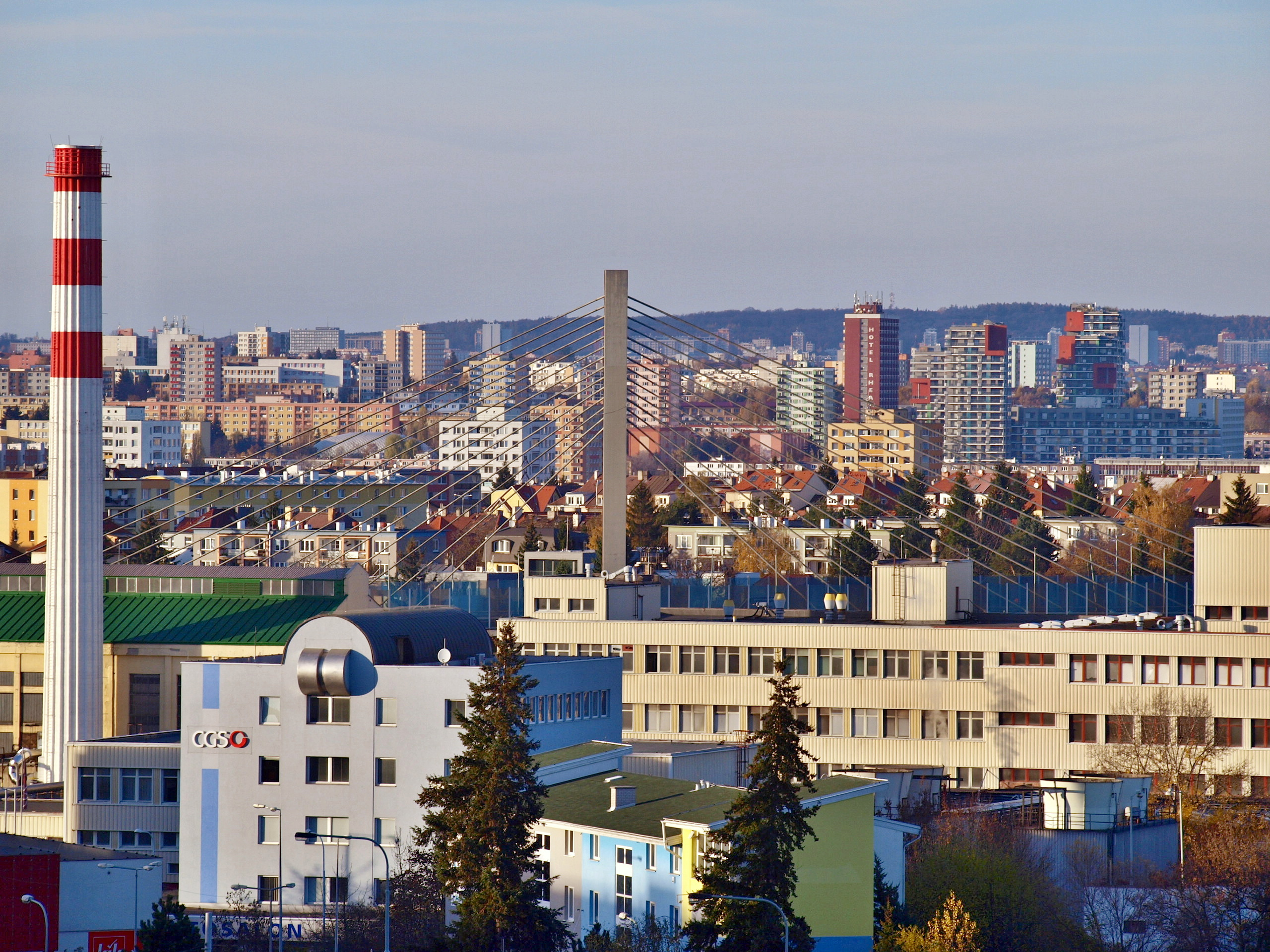 Záběhlice